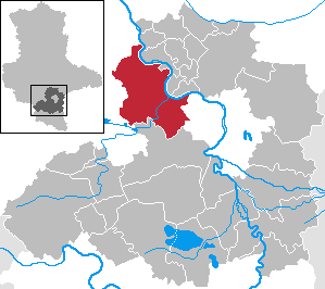 Salzatal in Sachsen-Anhalt - Saalekreis